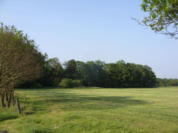 Holtgast